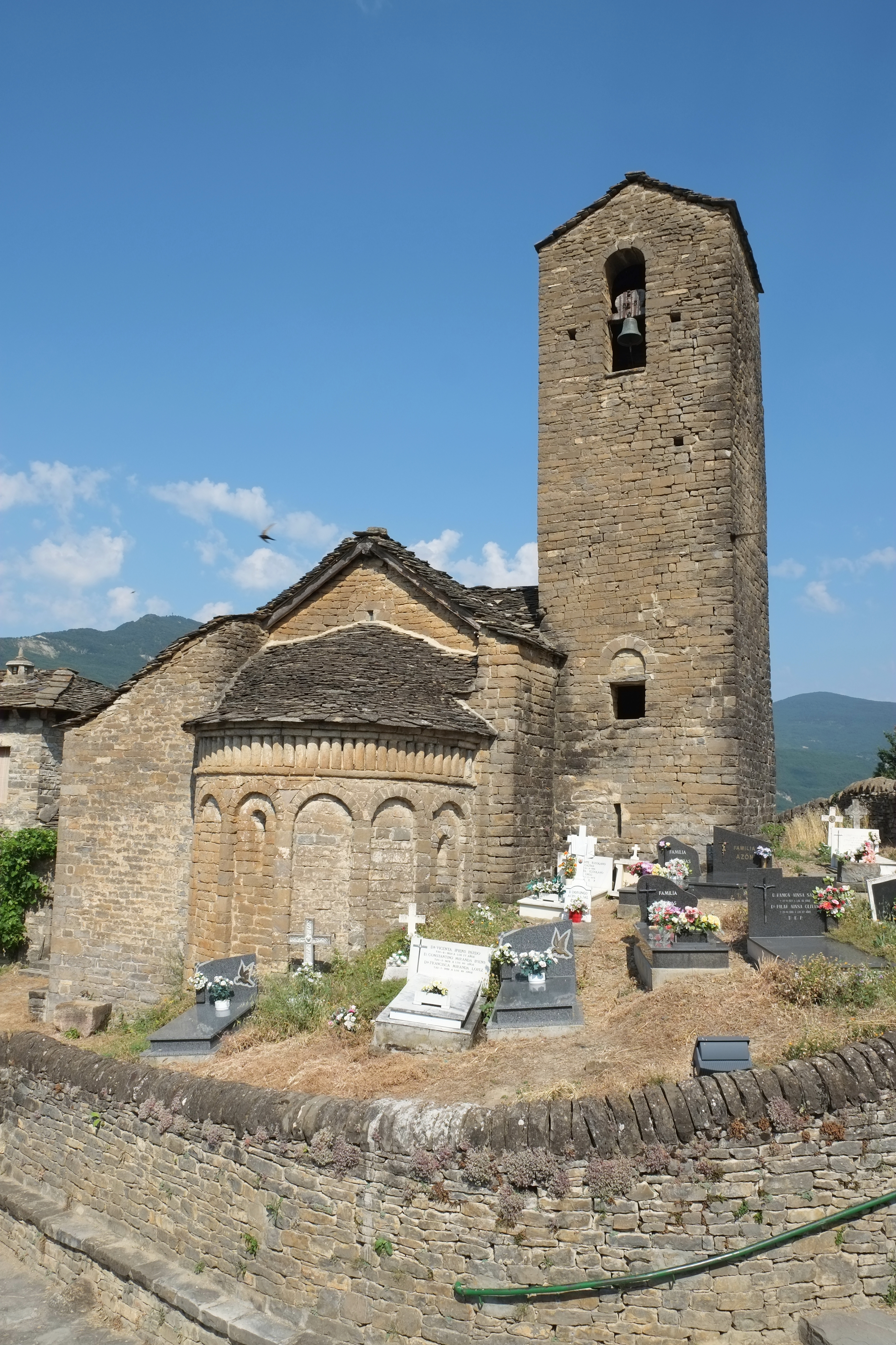 Kirche San Martín in Oliván in der Provinz Huesca in Aragonien (Spanien)